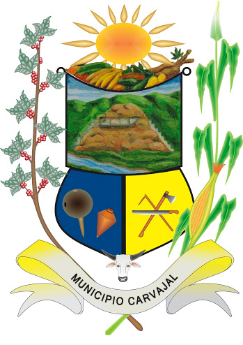 Escudo del Municipio Francisco del Carmen Carvajal (Anzoátegui)